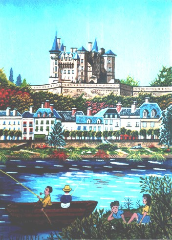 CHATEAU_DE_SAUMUR1.jpg